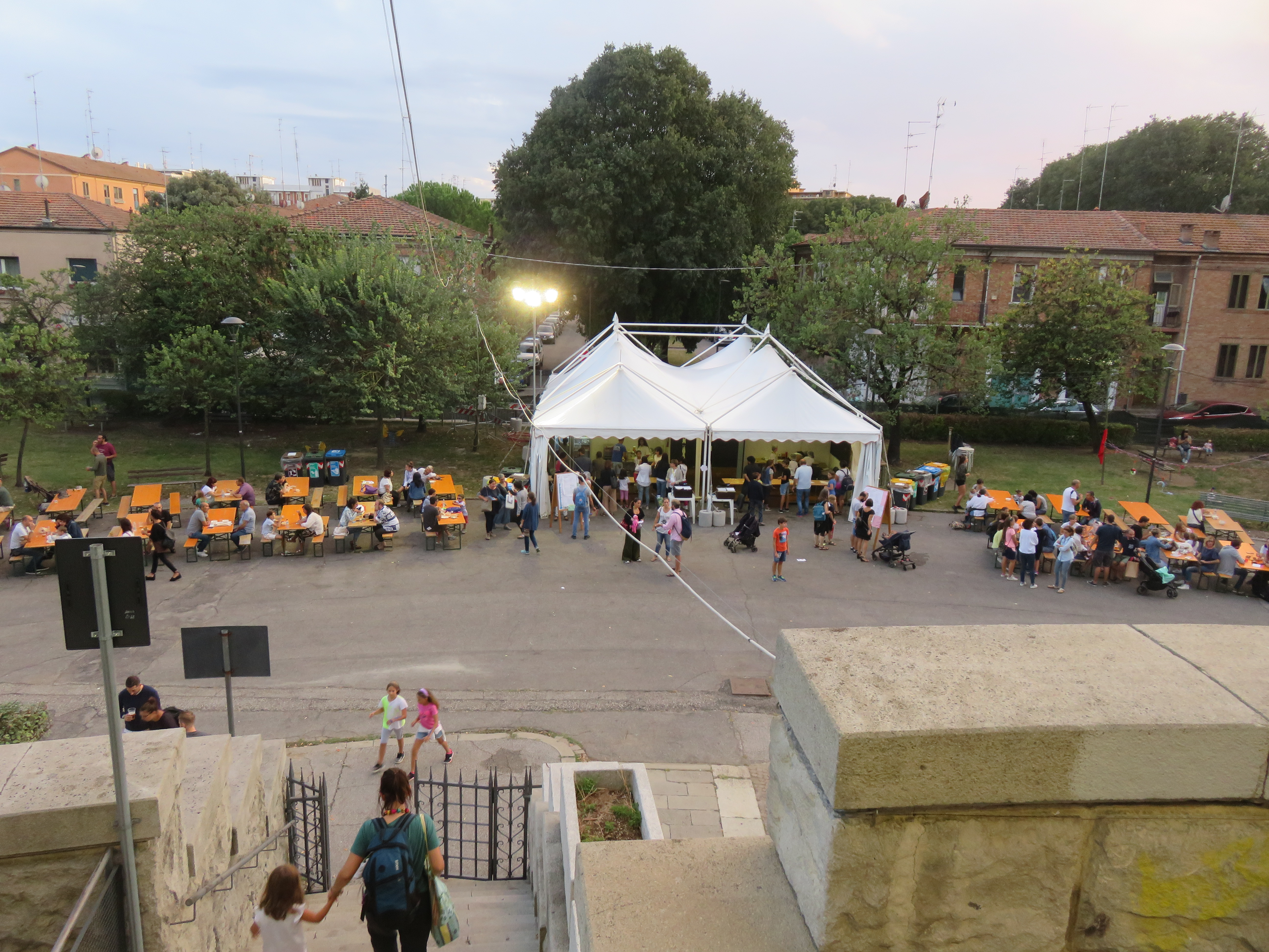 Piazza XXIV Maggio. Piazza attorno all' Acquedotto di Ferrara. Manifestazione